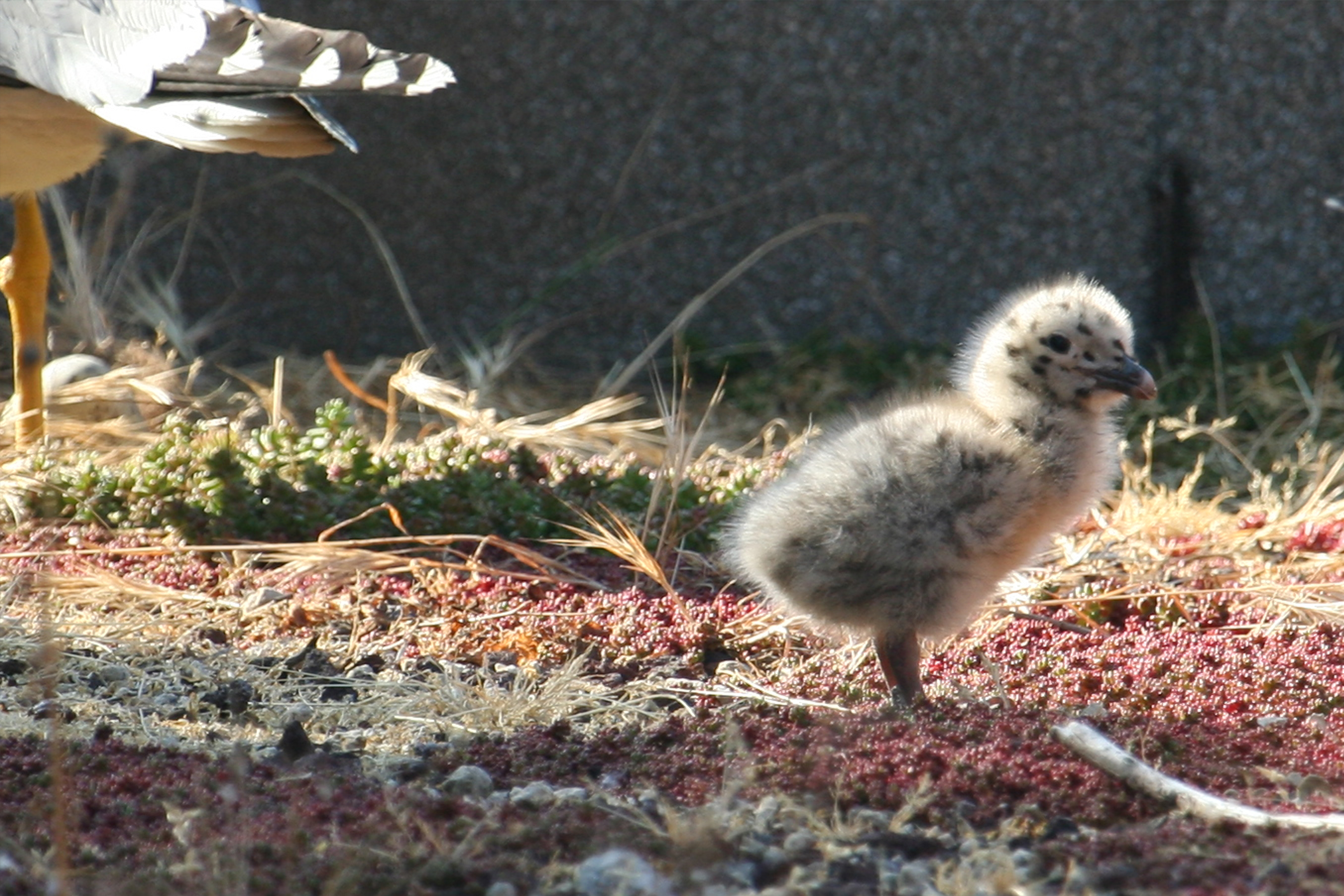 Goéland argenté immature